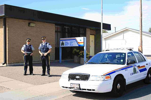 RCMP detachment in Warman Saskatchewan.